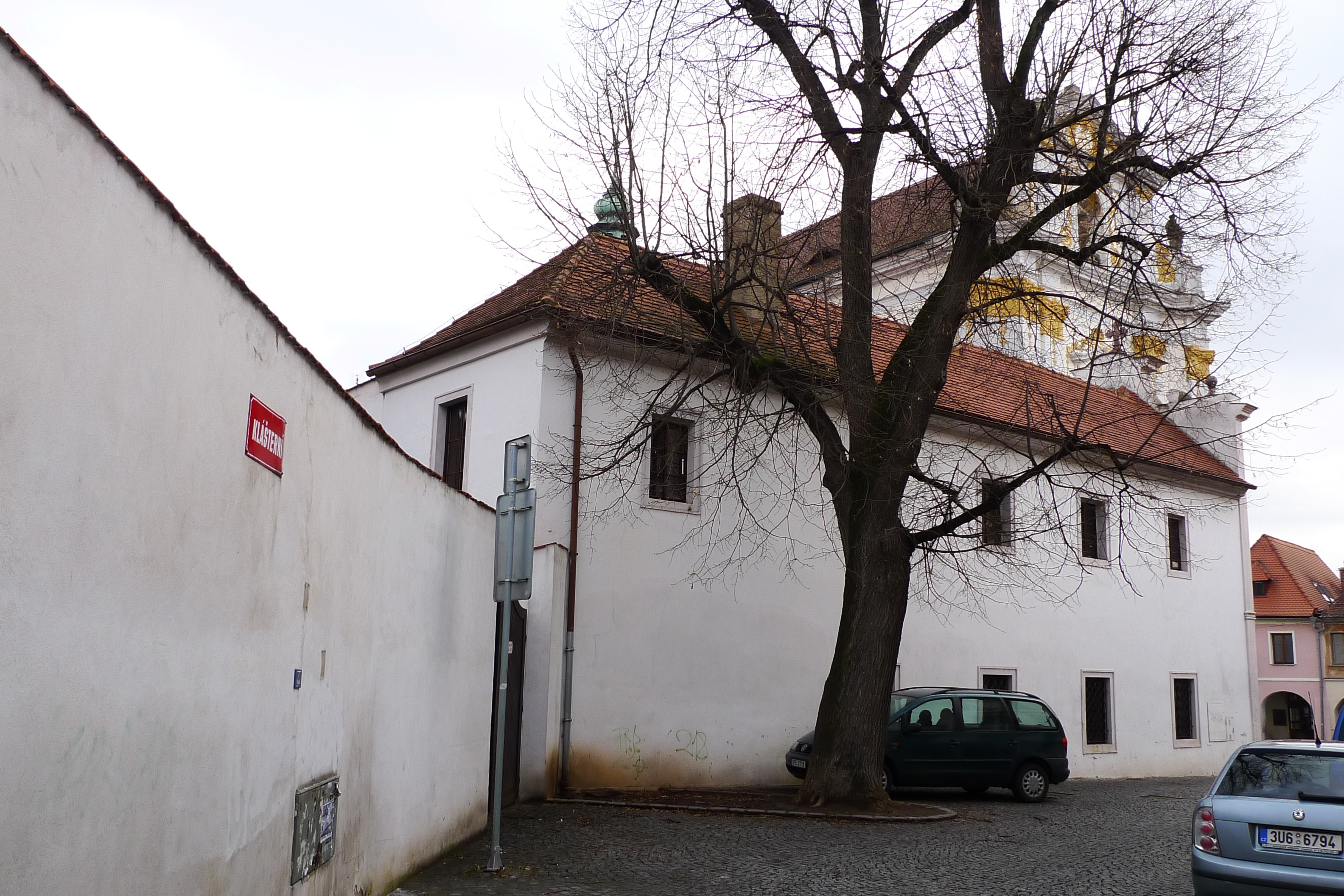 Klášter dominikánský (Litoměřice), Klášterní, Velká dominikánská 92/1, Litoměřice